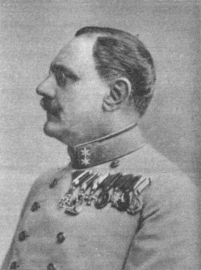 Emil Silvester Colerus von Geldern (1856-1919), Austrian-Hungarian general